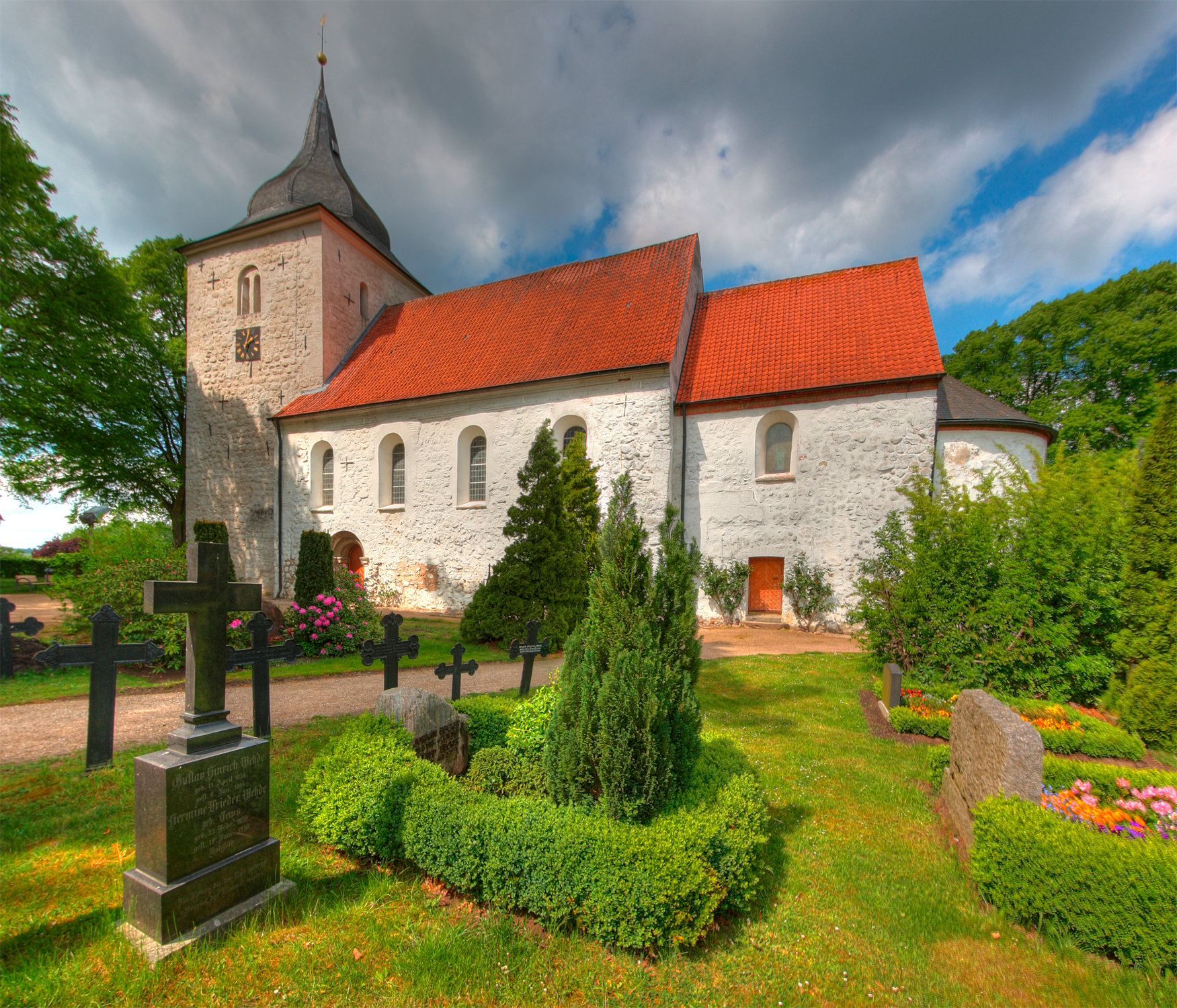 Petrikirche in Bosau im Nachmittagslicht